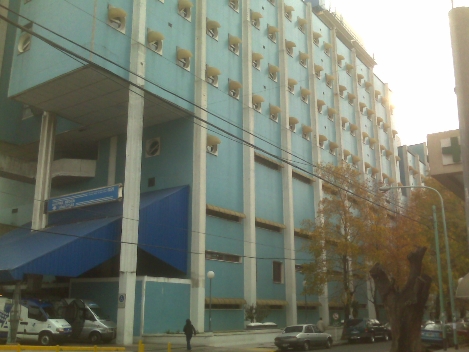 Naval Hospital, Clorindo Testa, 1970. Facing Parque Centenario, Buenos Aires, Argentina.